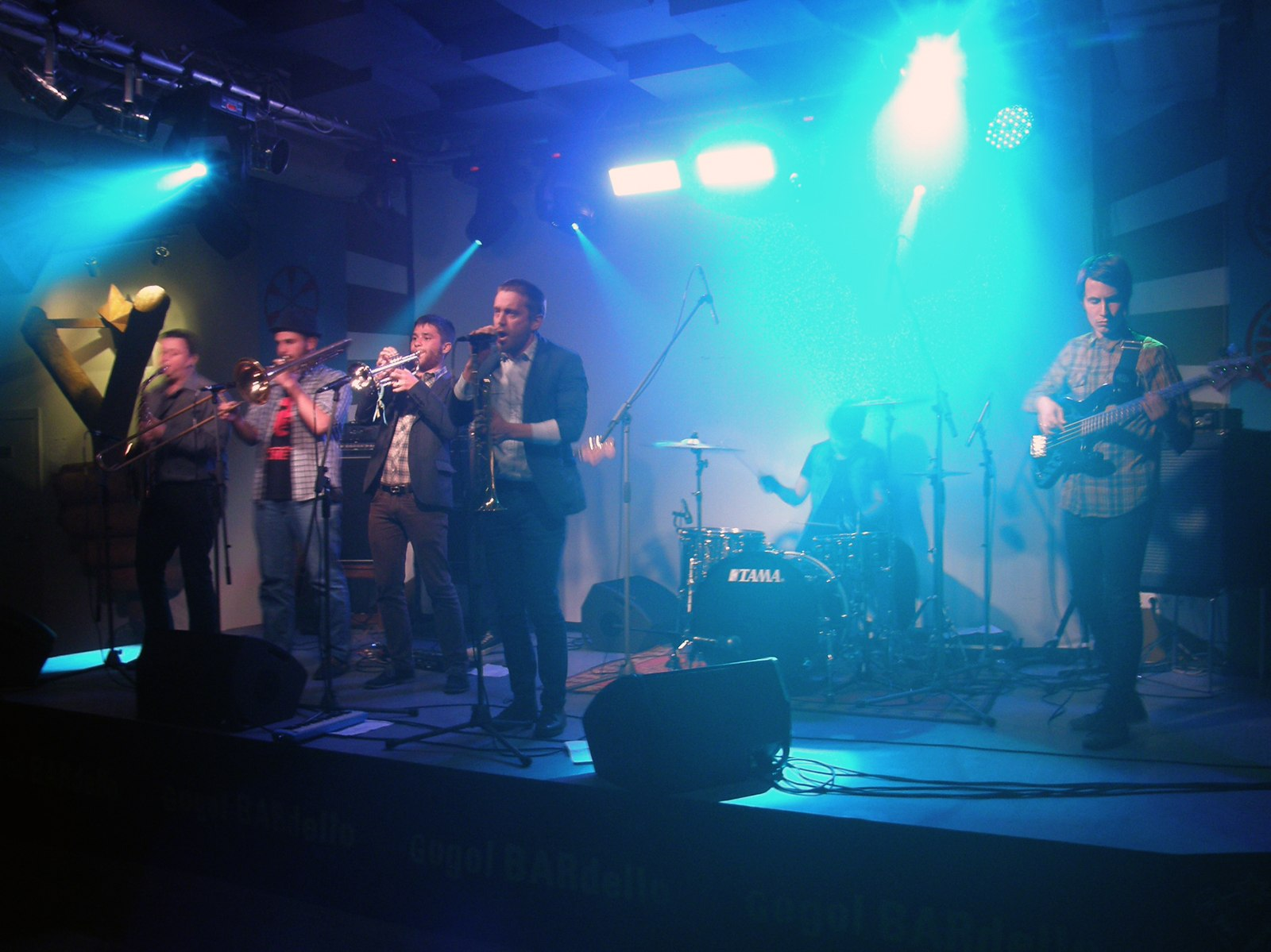 Мартові в музичному барі Gogol Bardello